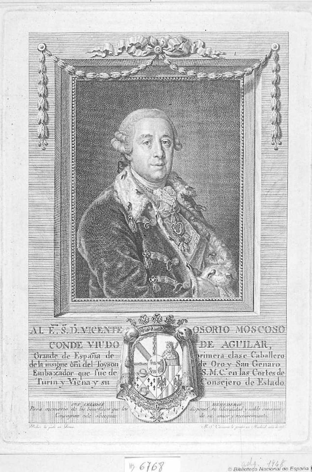 Retrato de Viente Osorio de Moscoso, Weiker le pintò en Viena ; M. S. Carmona le grabó en Madrid año de 1786. Madrid, Biblioteca Nacional de España